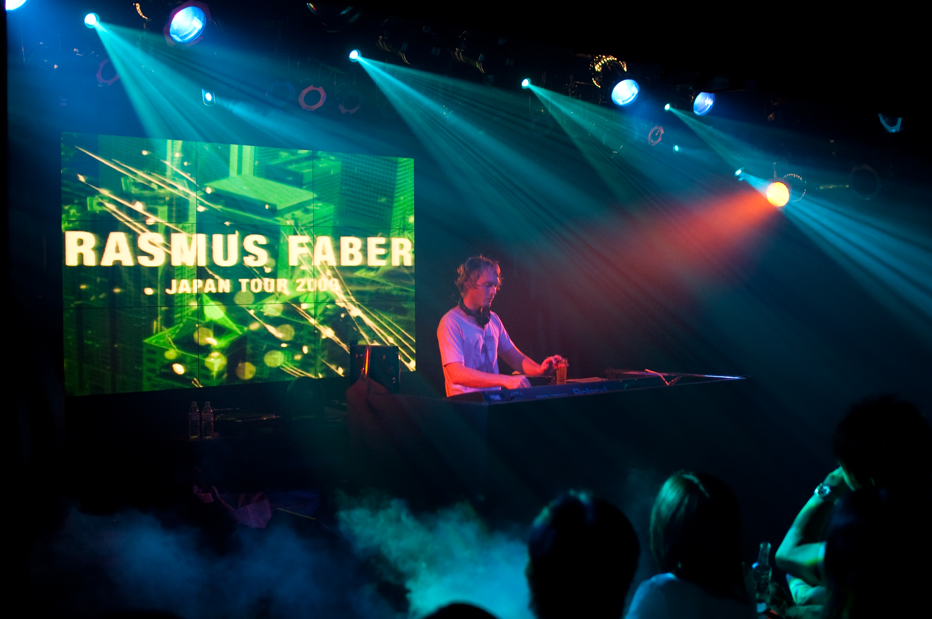 DJ: Rasmus Faber